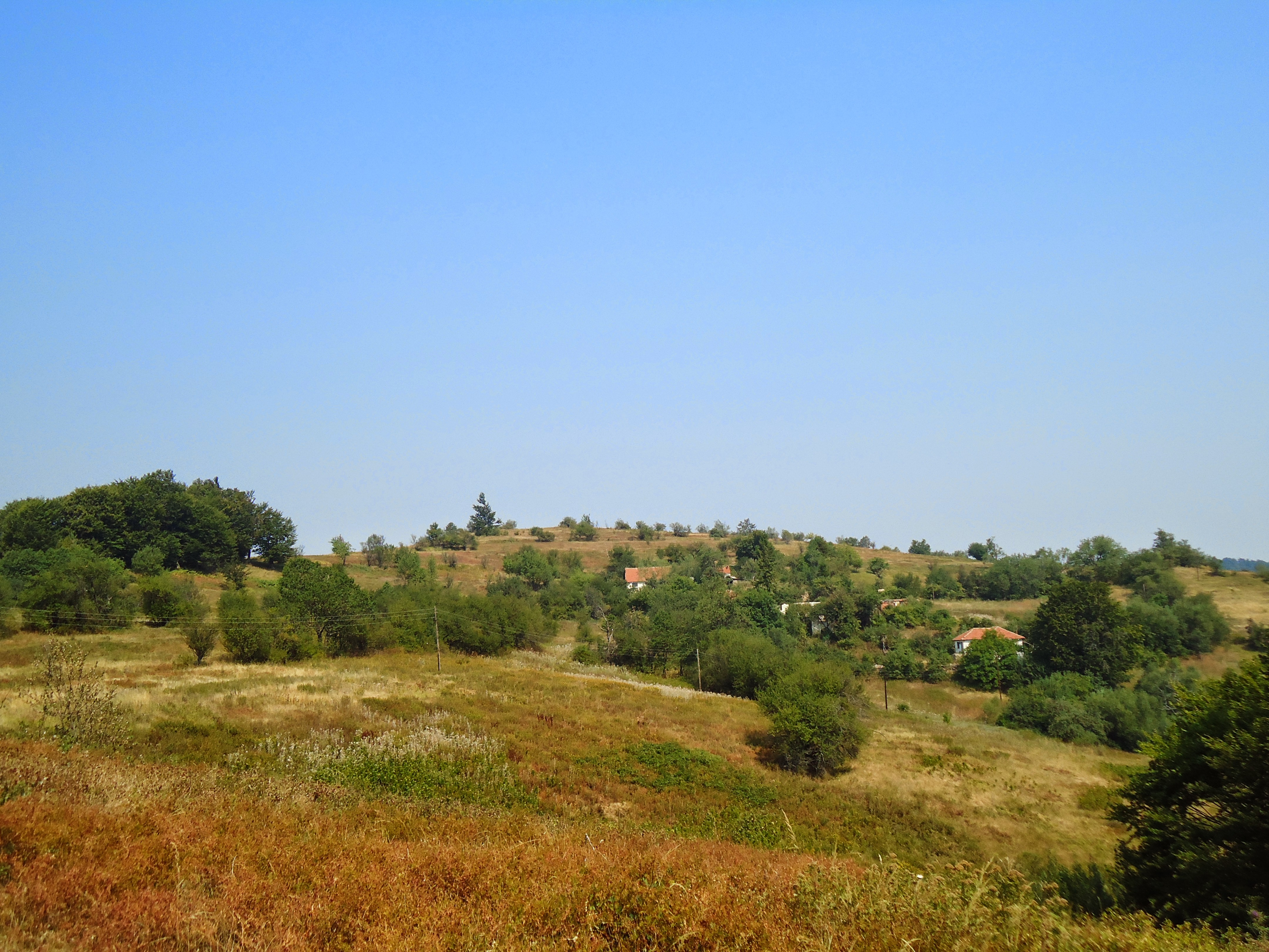 Zarbince, Serbia